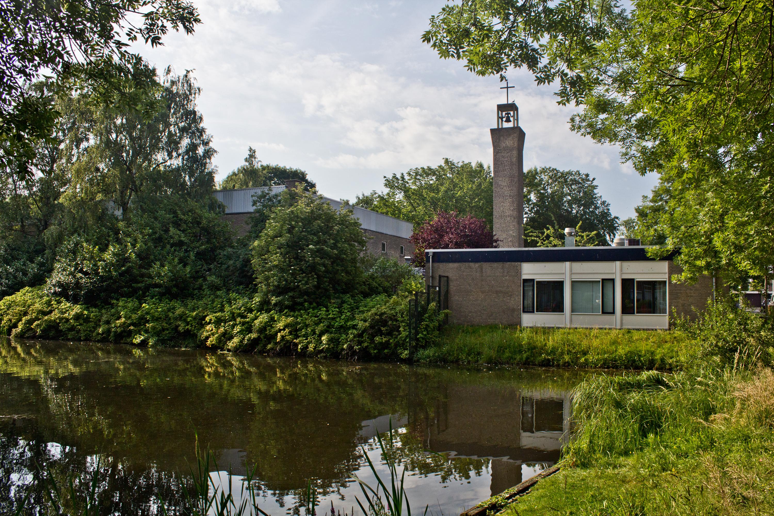 Zicht op een deel van de Heilige Franciscuskerk gevestigd aan het Belgieplein 6 in Breda. Gezien vanaf de Molstraat. Ontworpen door S.F. Steeneken. Gebouwd 1967/68.